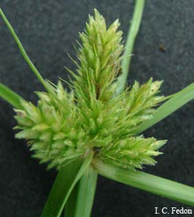 Cyperus aggregatus foto tomada en el Jardín Botánico de la UCV, Caracas, Venezuela